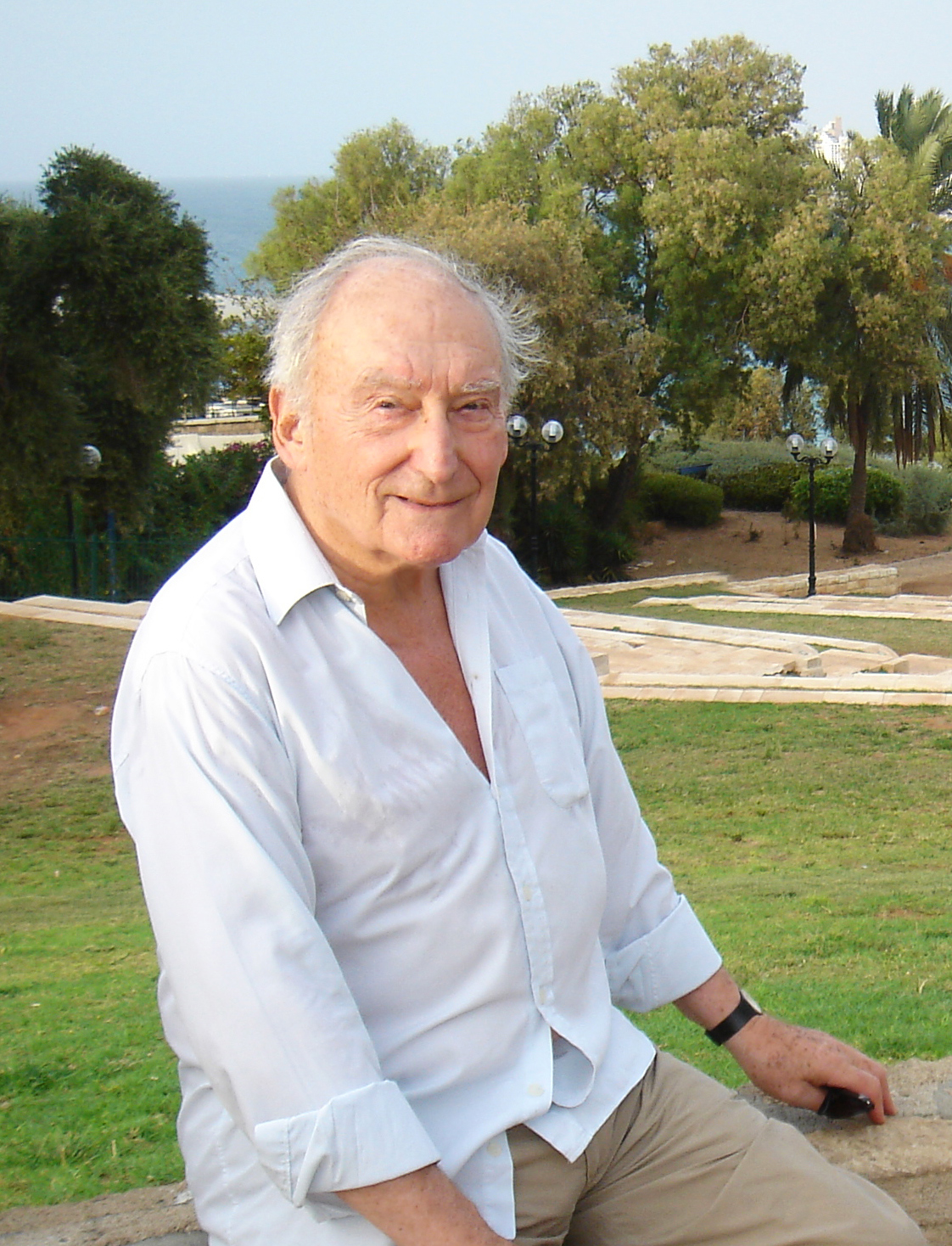 photographie de Pierre Barillet en bord de mer, année 2013